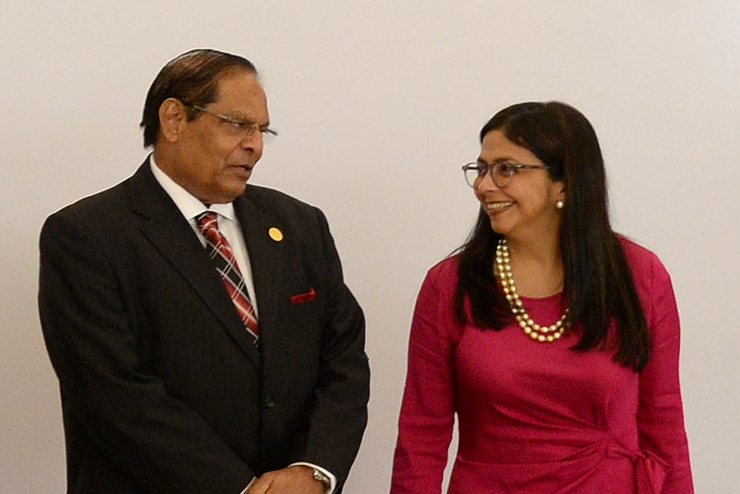 Gobierno de Chile